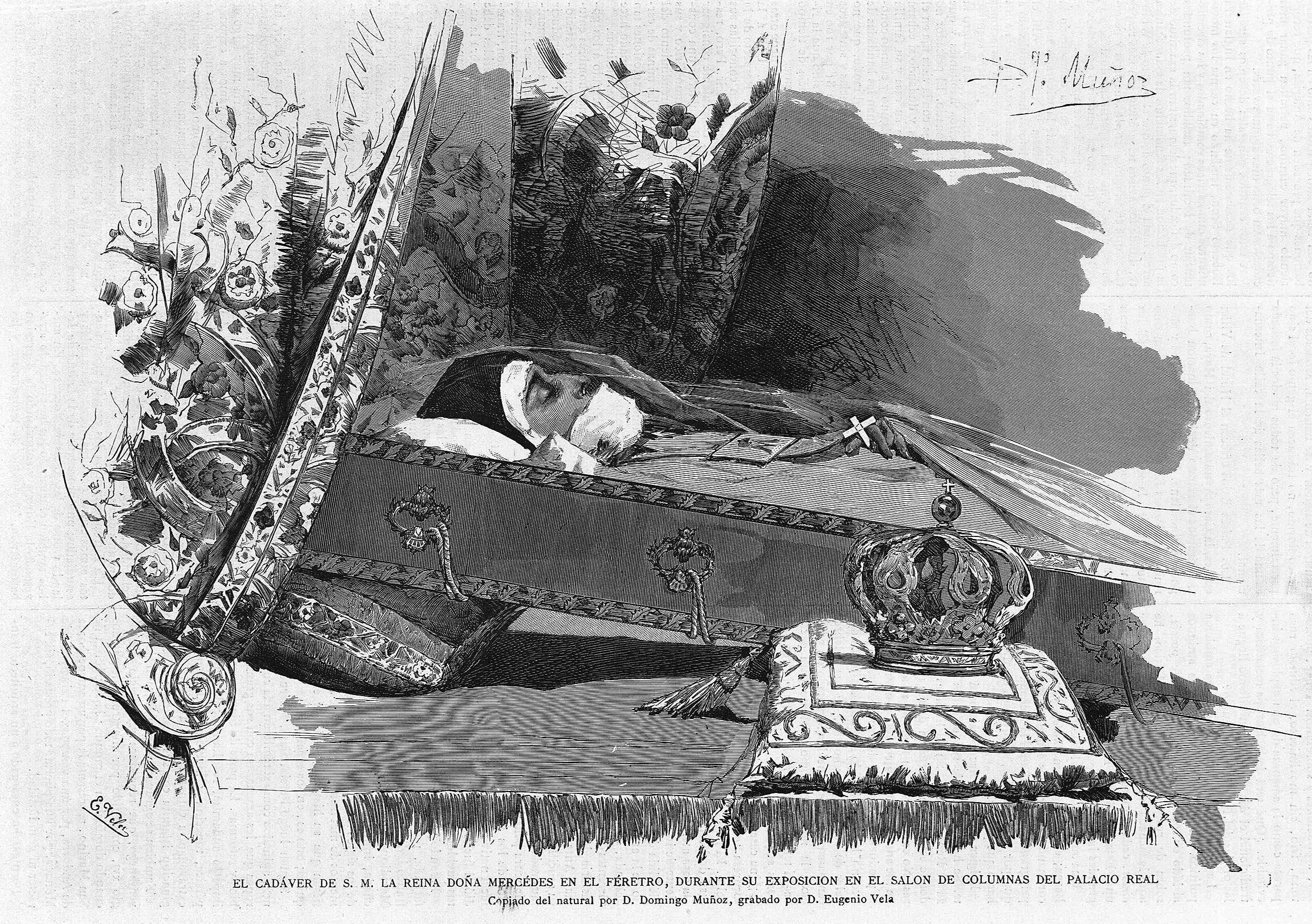 El cadáver de la reina Mercedes en el féretro.